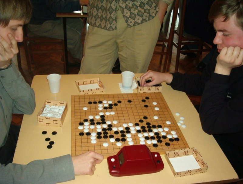 GO Tournament in Łaziska Górne